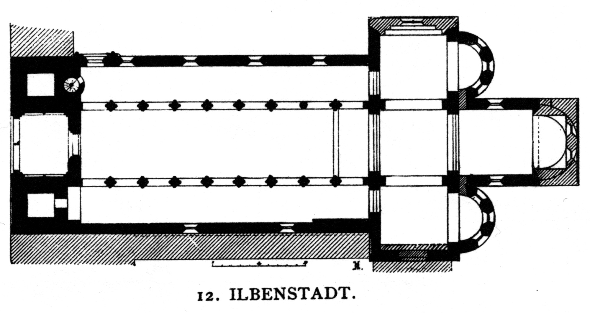 Ilbenstadt, Dom der Wetterau. Floor plan.